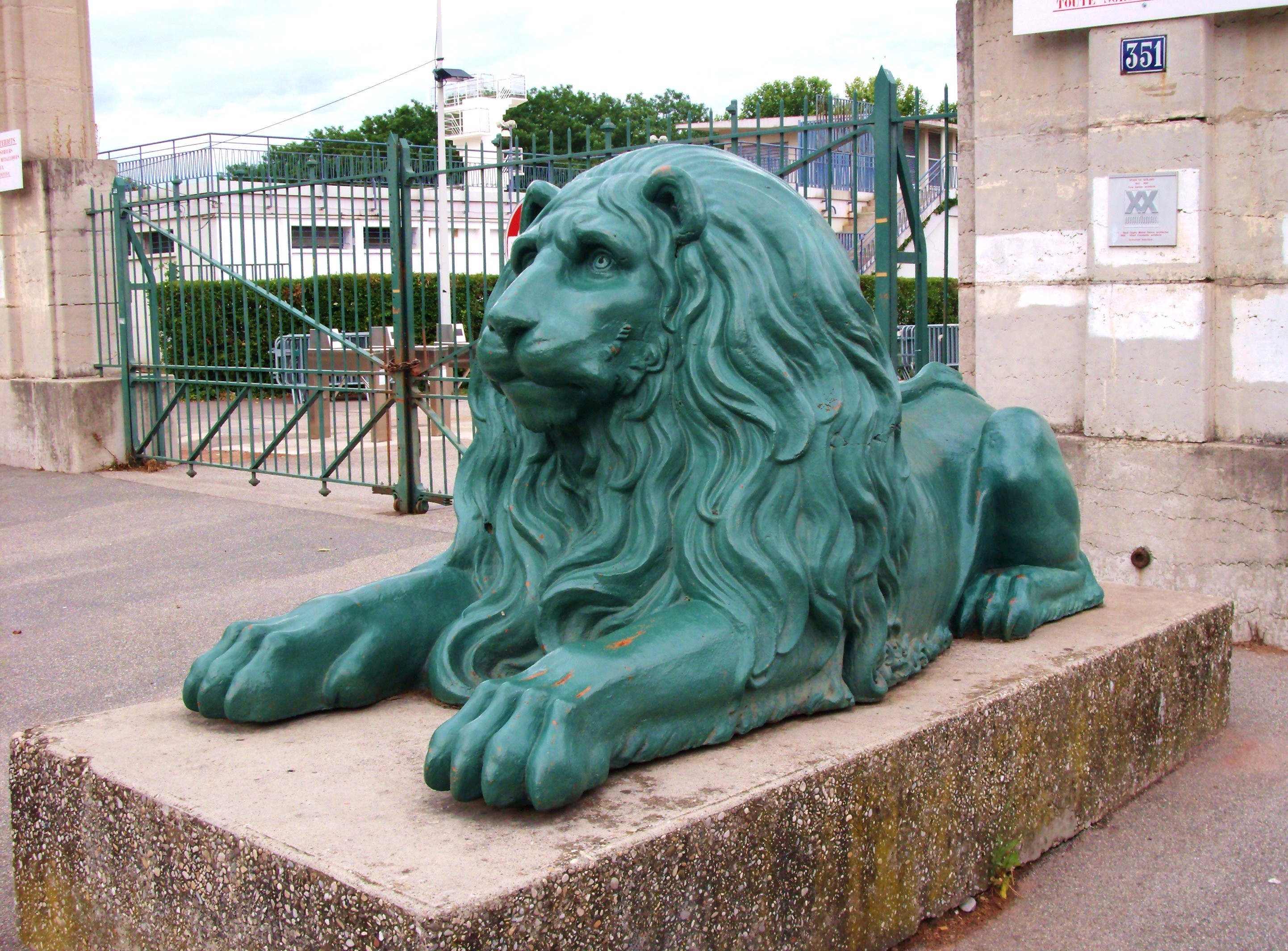 Un des deux lions placés à l'entrée du stade de Gerland à Lyon dans lequel joue l'Olympique Lyonnais.